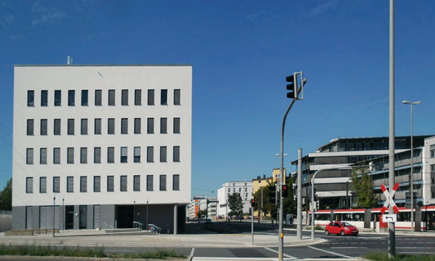 Das BB-Gebäude (Architektur, Elektrotechnik, Feinwerktechnik, Informationstechnik, Betriebswirtschaft, Sozialwissenschaften) an der Ecke Bahnhofstraße/Dürrenhofstraße (Bahnhofstraße 87) der TH Nürnberg